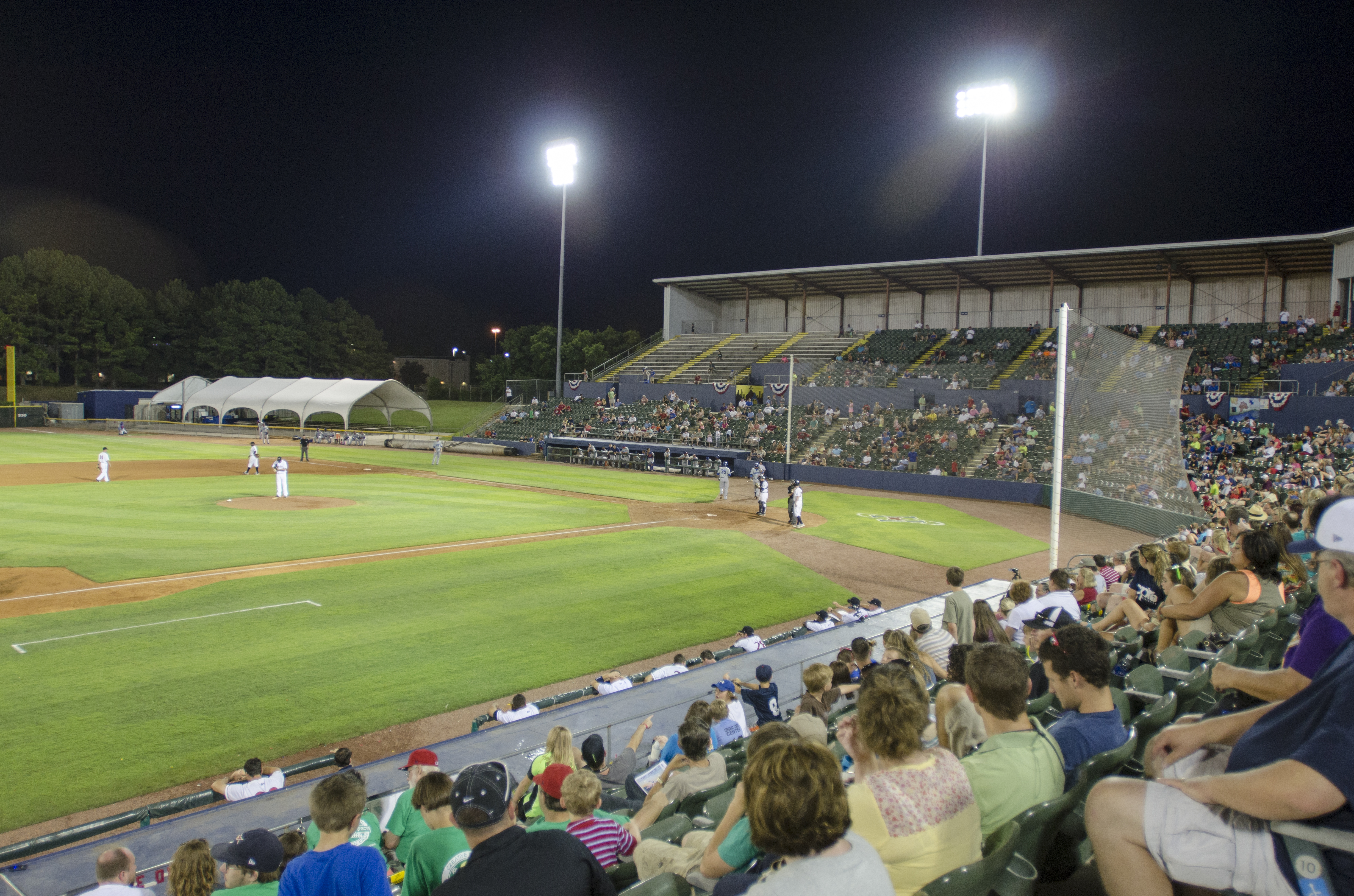 Huntsville Stars vs Chatanooga Lookouts